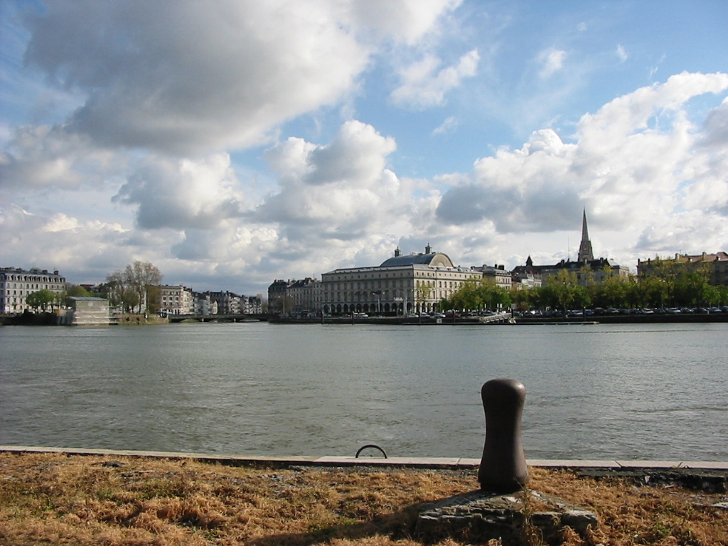 Bayonne vue de la rive droite de l'Adour Au premier plan, l'Adour, au niveau de l'Échaugette, marquant la confluence avec la Nive. Au second plan, l'Hôtel de Ville avec, à sa gauche, le pont Mayou sur la Nive. Photo personnelle Christian Amet, prise le 8 avril 2004.